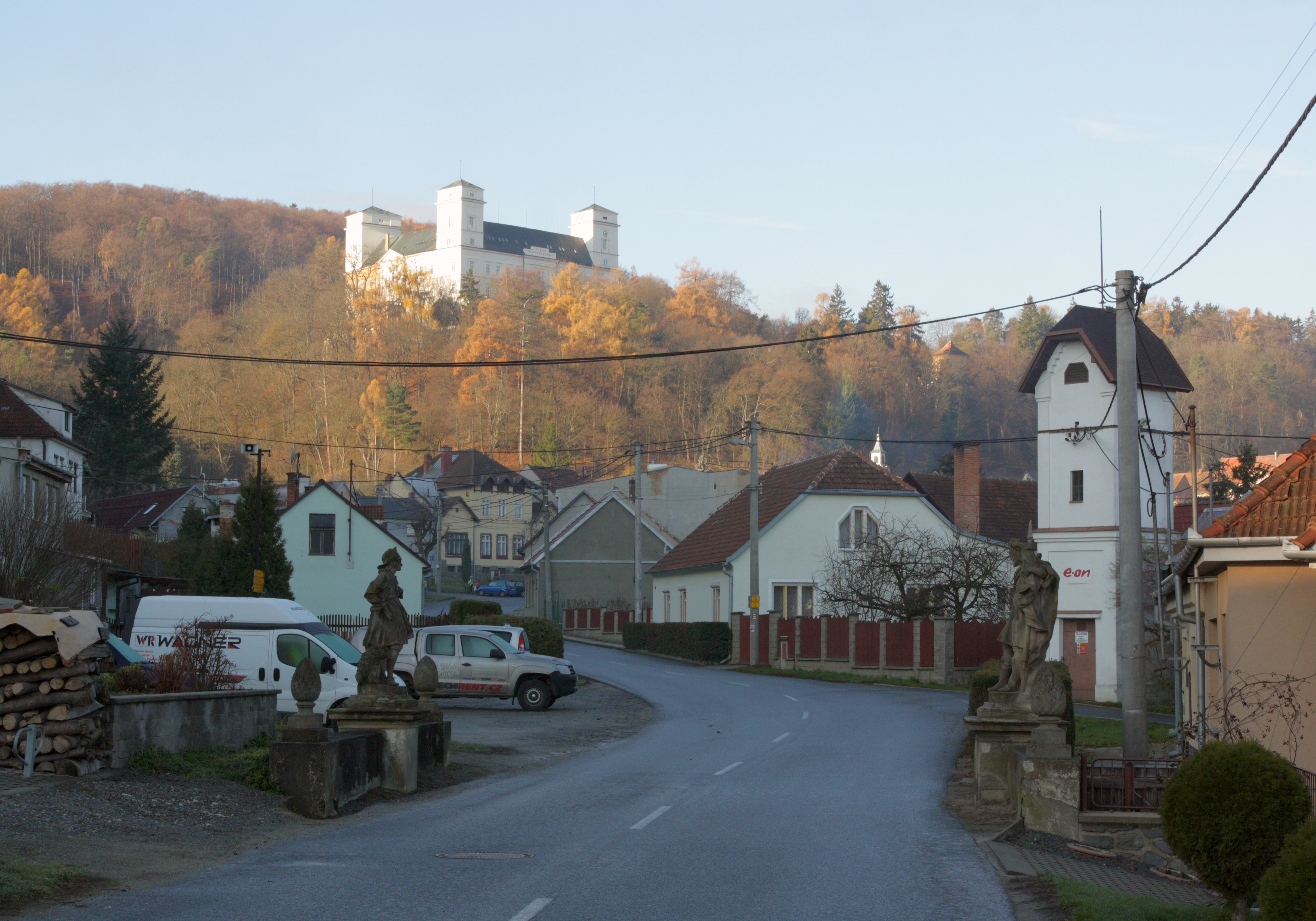 Račice (Račice-Pístovice) - východní okraj vsi, pohled od mostu